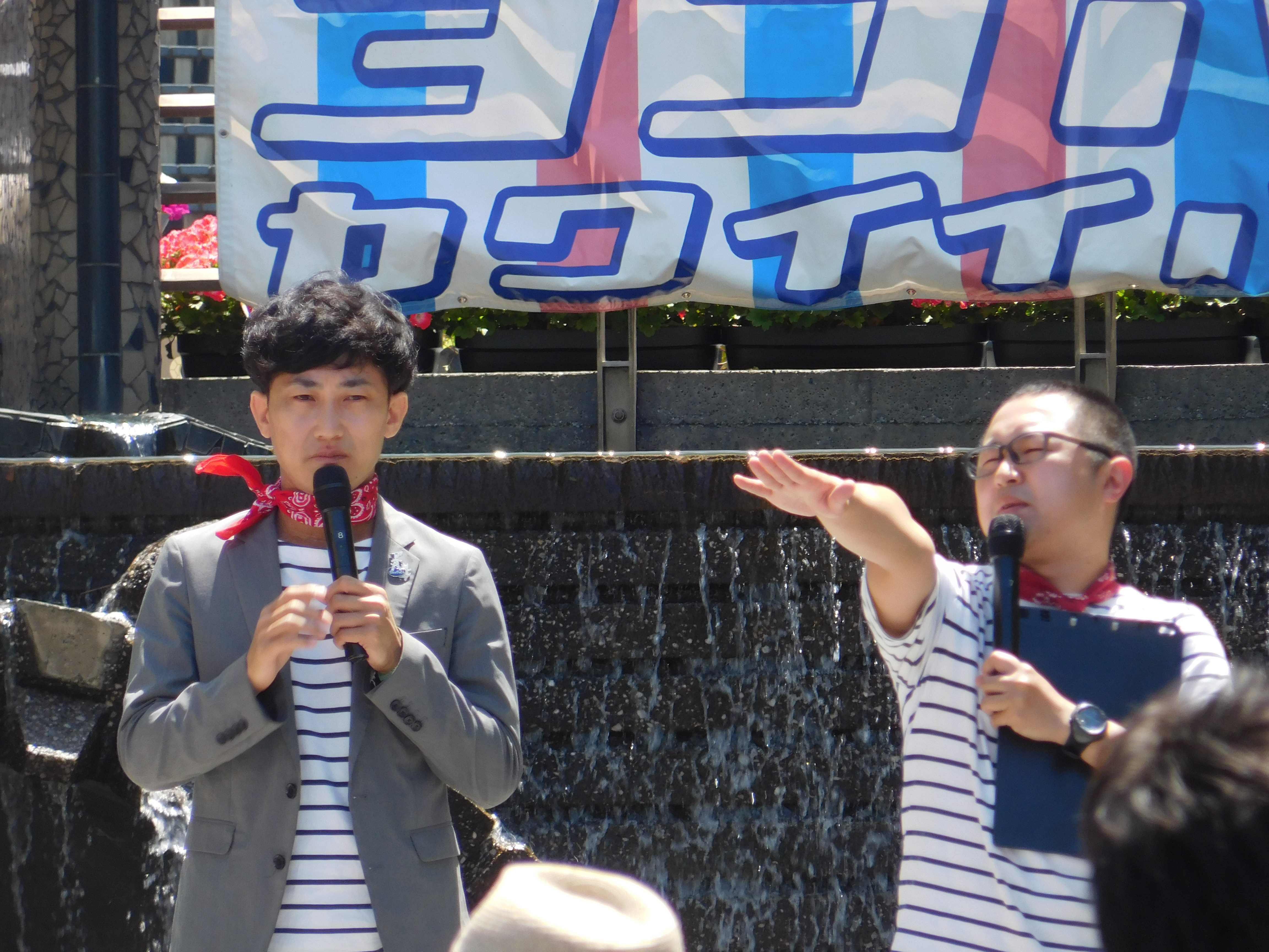 お笑いコンビ 横浜ヨコハマ ヨコハマカワイイパーク２０１７にて 撮影OKでした